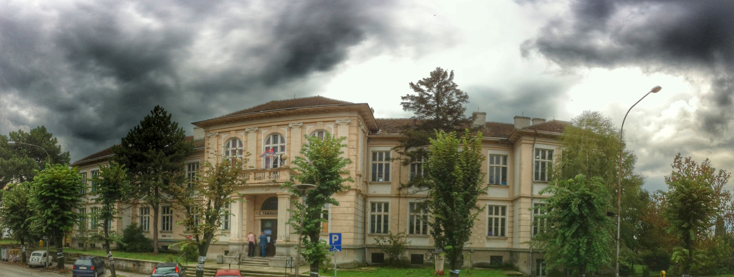 Српски (ћирилица): Зграда се налази у улици Вука Караџића бр.18. Подигнута на месту старе гимназије 1928-29.